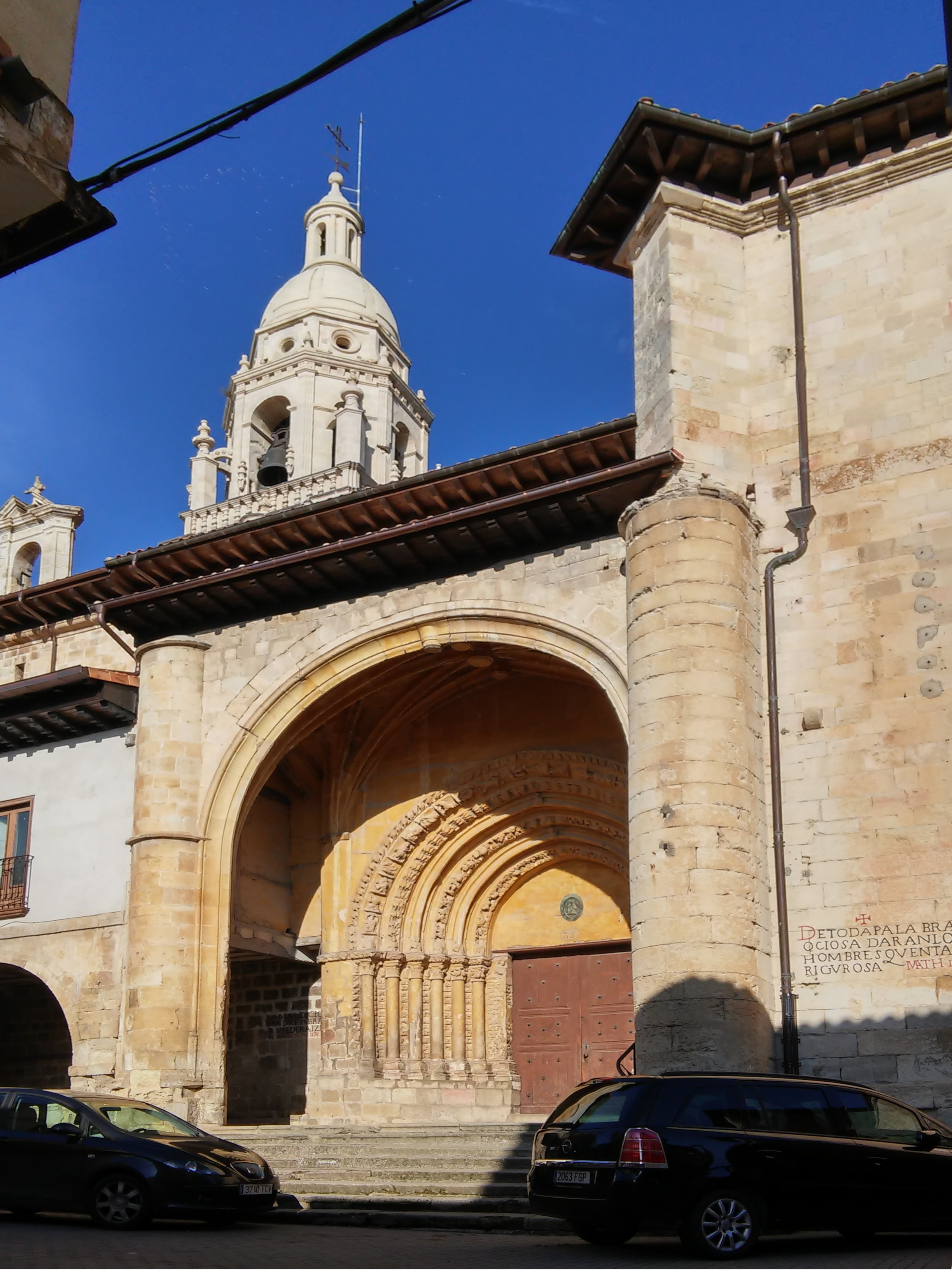 Trebiñuko elizaren ataria